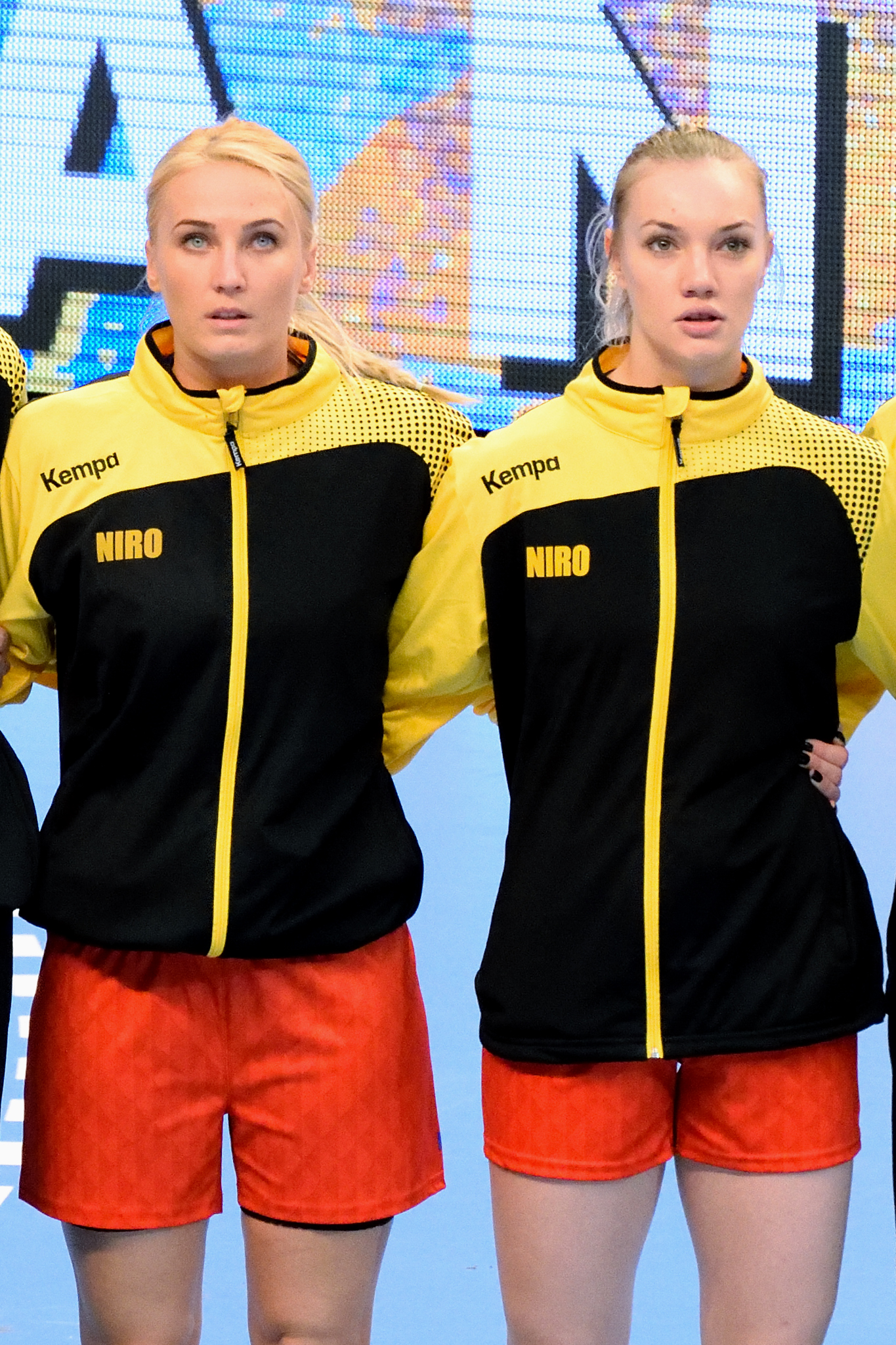 Laura Chiper et Ana Maria Tănasie Le 29 novembre 2015, lors du match Roumanie / Cuba pour le compte du TIPIFF 2015. Au stade Pierre de Coubertin à Paris.